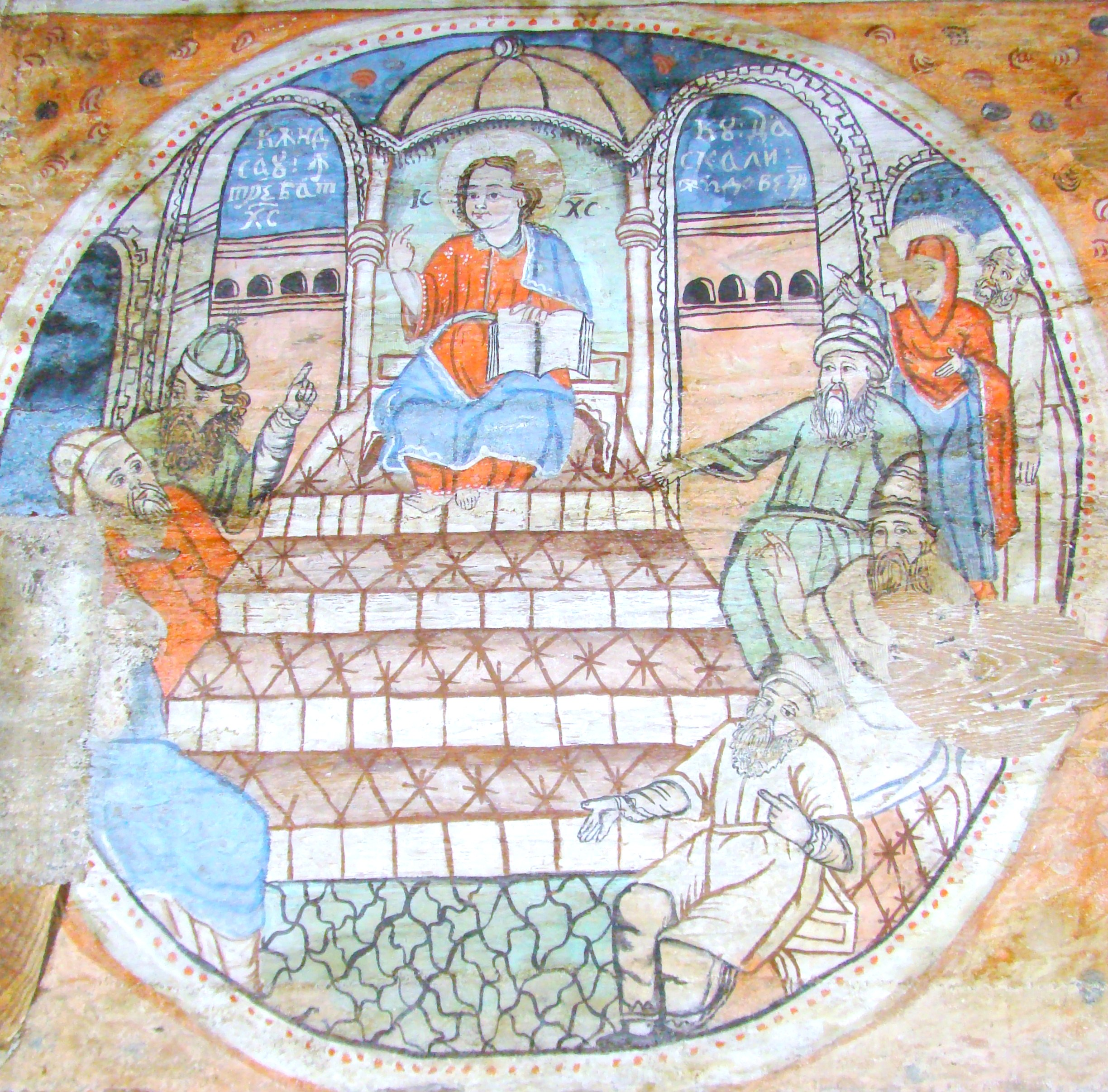 Biserica de lemn "Intrarea Maicii Domnului în Biserică" , sat BÂRSANA